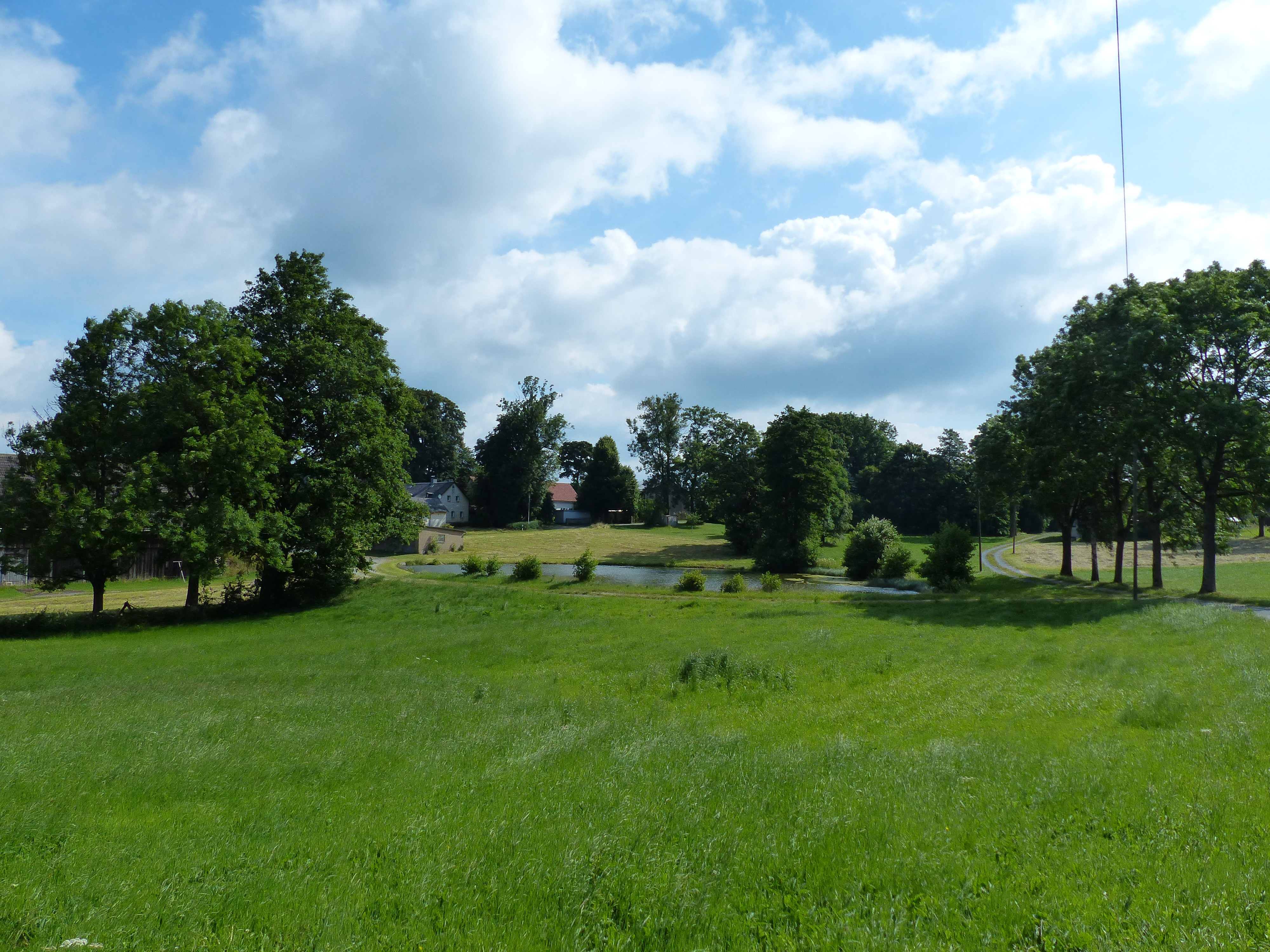 Baudenkmäler und Bauwerke in Querenbach